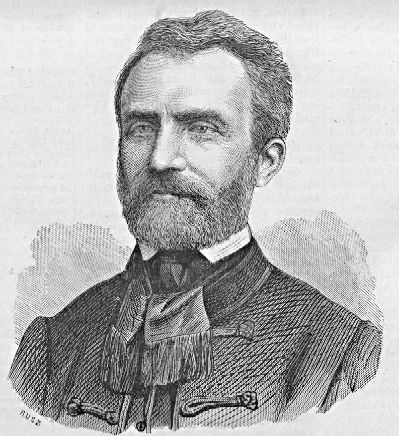 Pauler Tivadar (1816–1886) akadémikus, politikus, miniszter. Rusz Károly metszete (Vasárnapi Ujság, 1871. február 19.)